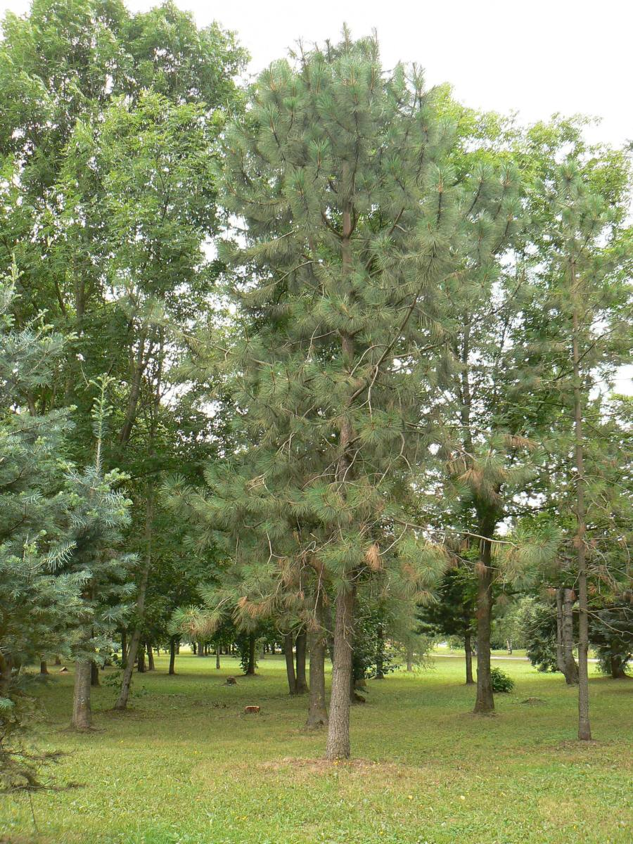 Kollane mänd Tartus puukooli pargis